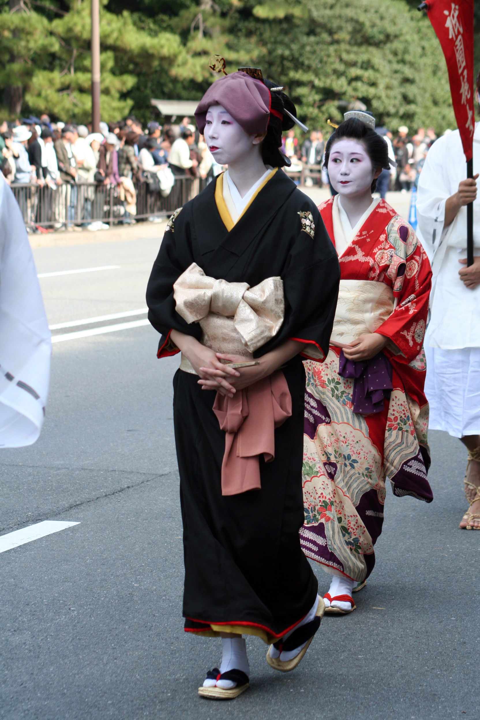 京都府京都市にて開催された時代祭。正午の御所から平安神宮までの行進の様子。2009年10月22日撮影。